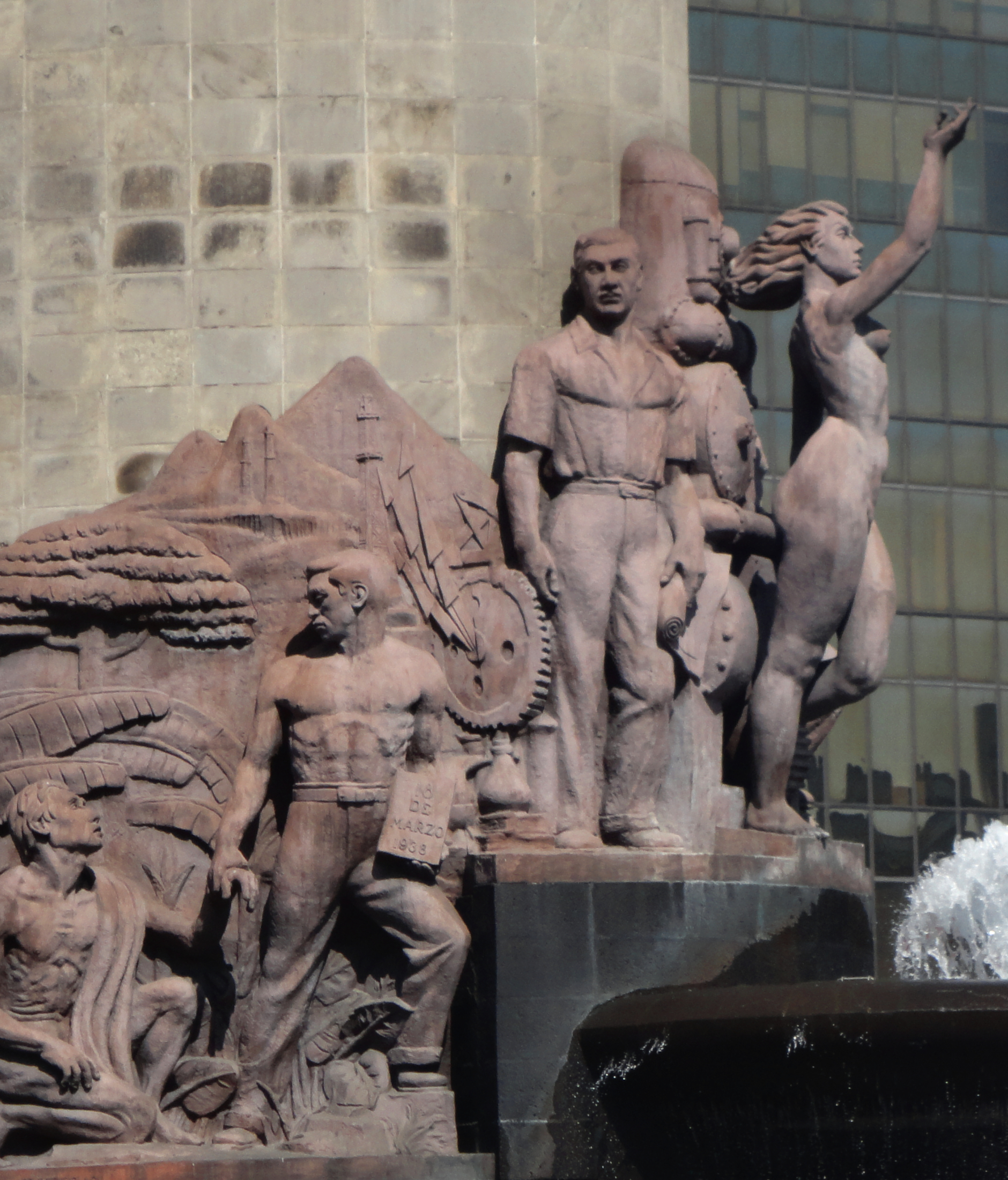 Fuente de Petróleos, CDMX, México. Obra del arquitecto Vicente Mendiola Quezada y del escultor Juan Fernando Olaguíbel Rosenzweig.